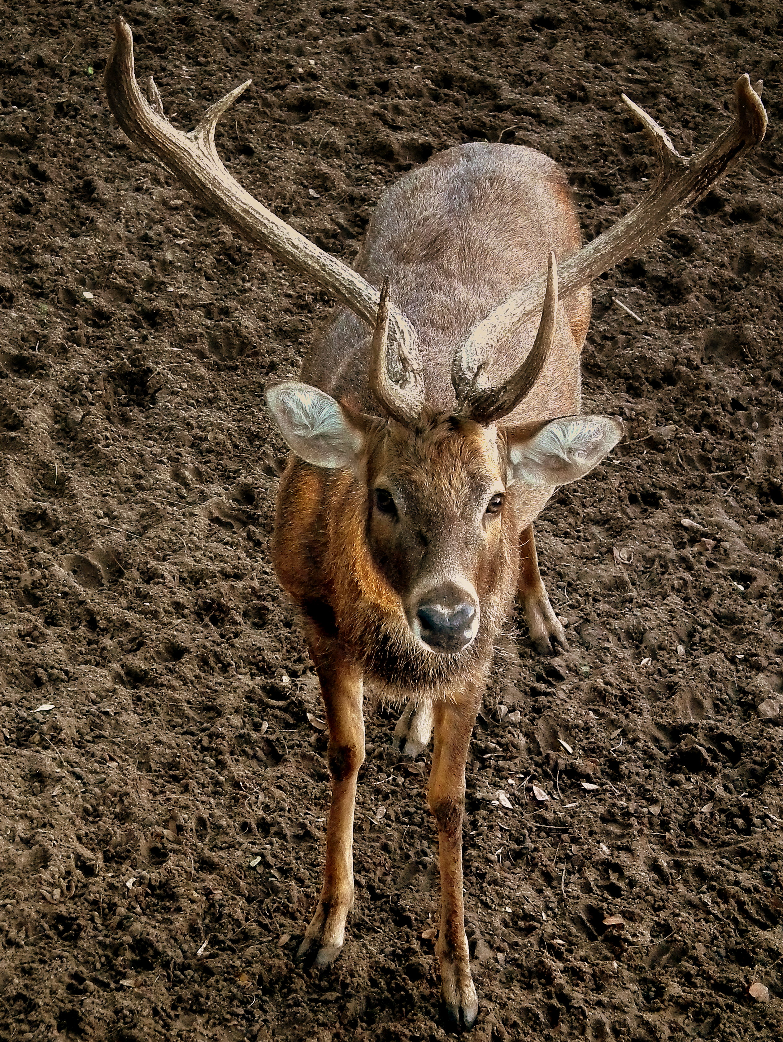 SAIGON ZOO VIETNAM JAN 2012